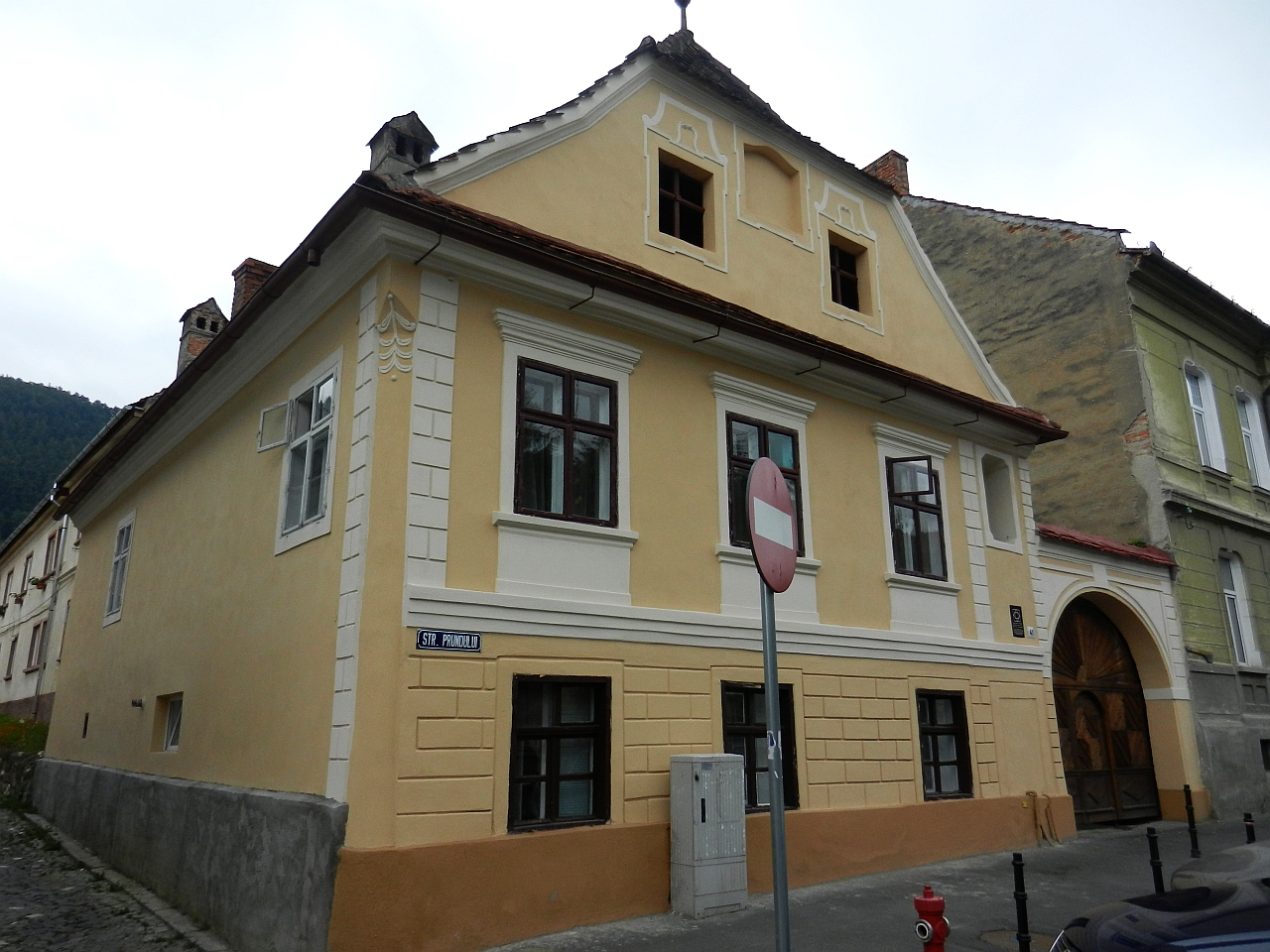 Casa Nicolae Teclu